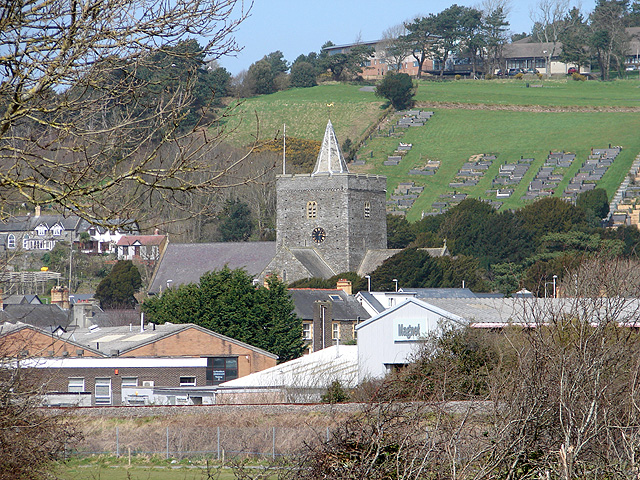 Llanbadarn Fawr Parish Church, Ceredigion, Wales